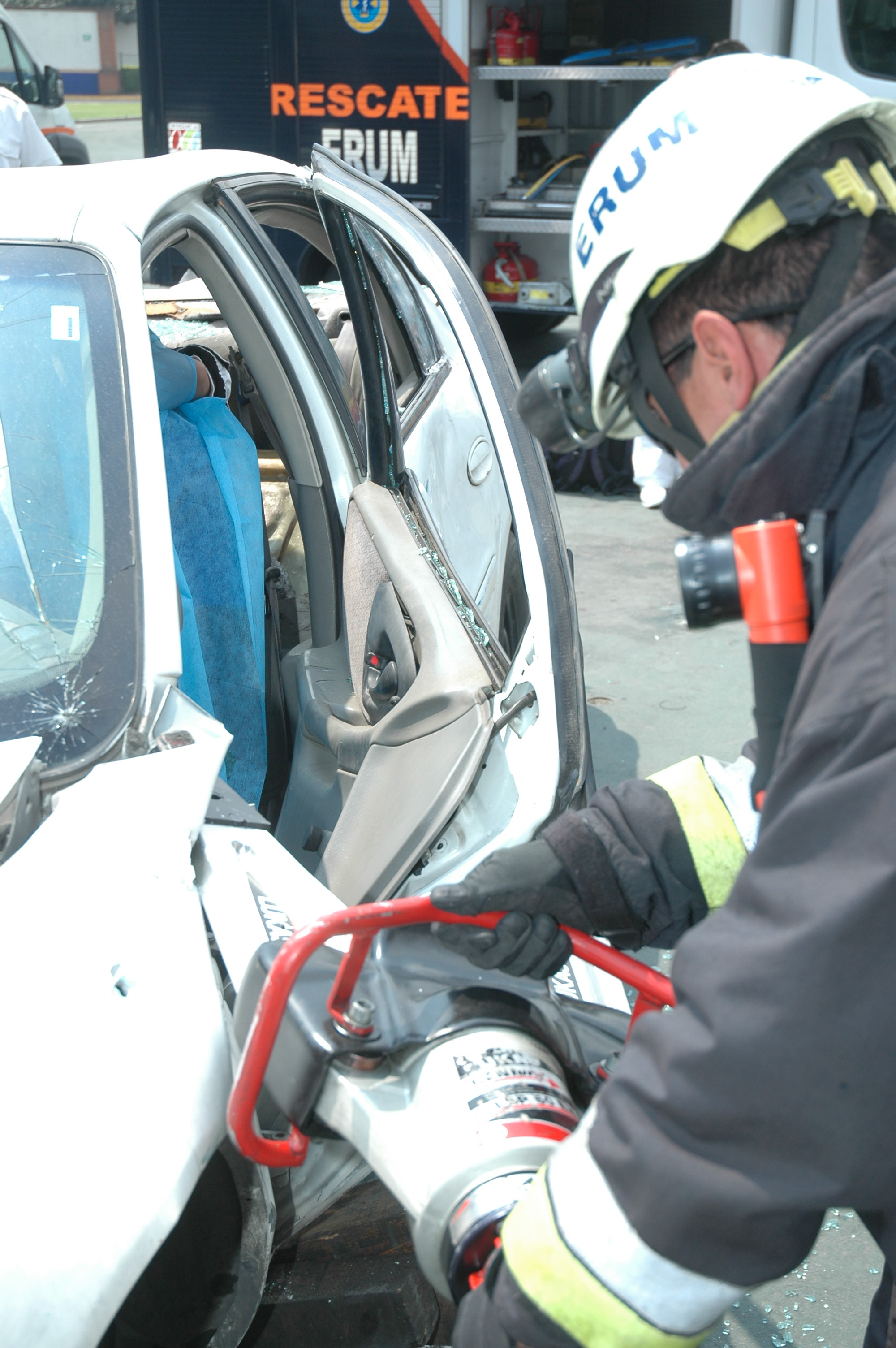 1 Usando las herramientas hidráulicas de rescate durante una demonstración del Escuadrón de Rescate y Urgencias Médicas de la Ciudad de México en ITESM Campus Ciudad de México